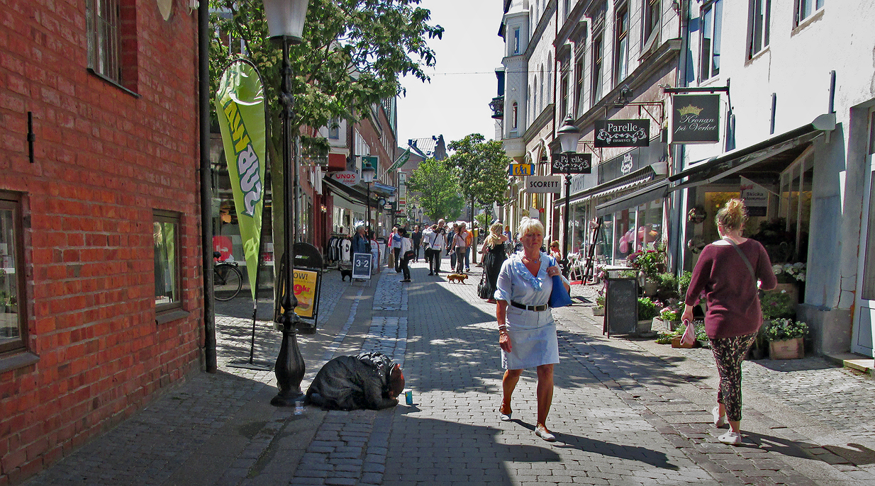 En tiggerska sitter hopsjunken med sin pappersmugg på Stora Östergatan i Ystad, 22 maj 2014.